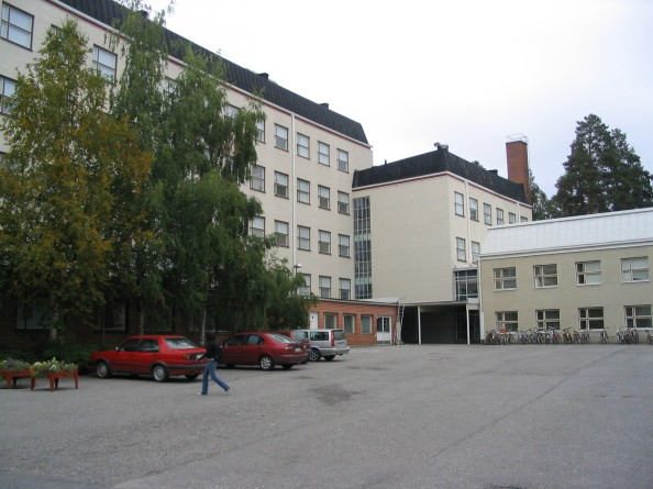 Linnanpellon koulu Kuopiossa